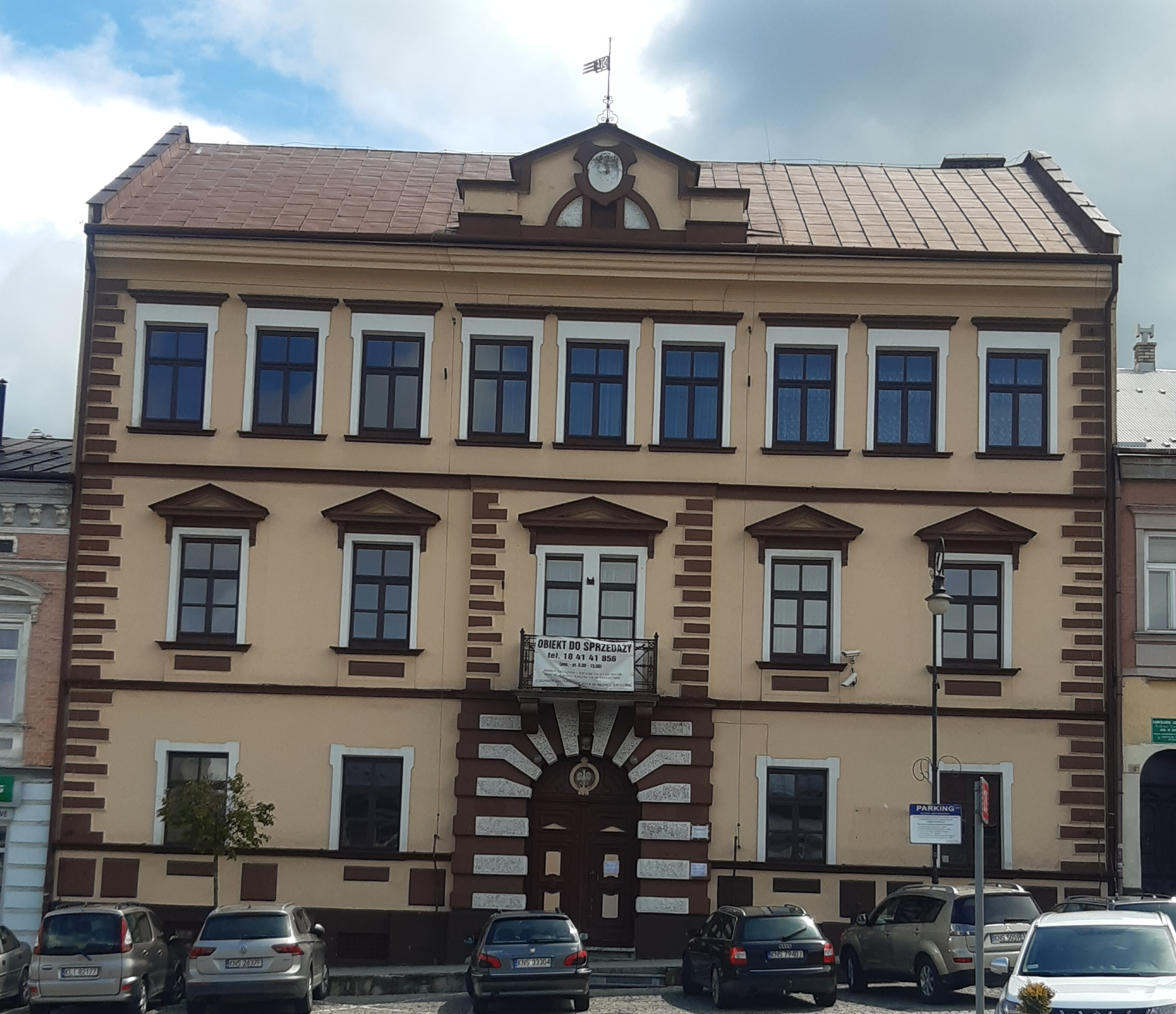 Zdjęcie przedstawia stary budynek Liceum Ogólnokształcącego im. Artura Grottgera w 2020 roku.